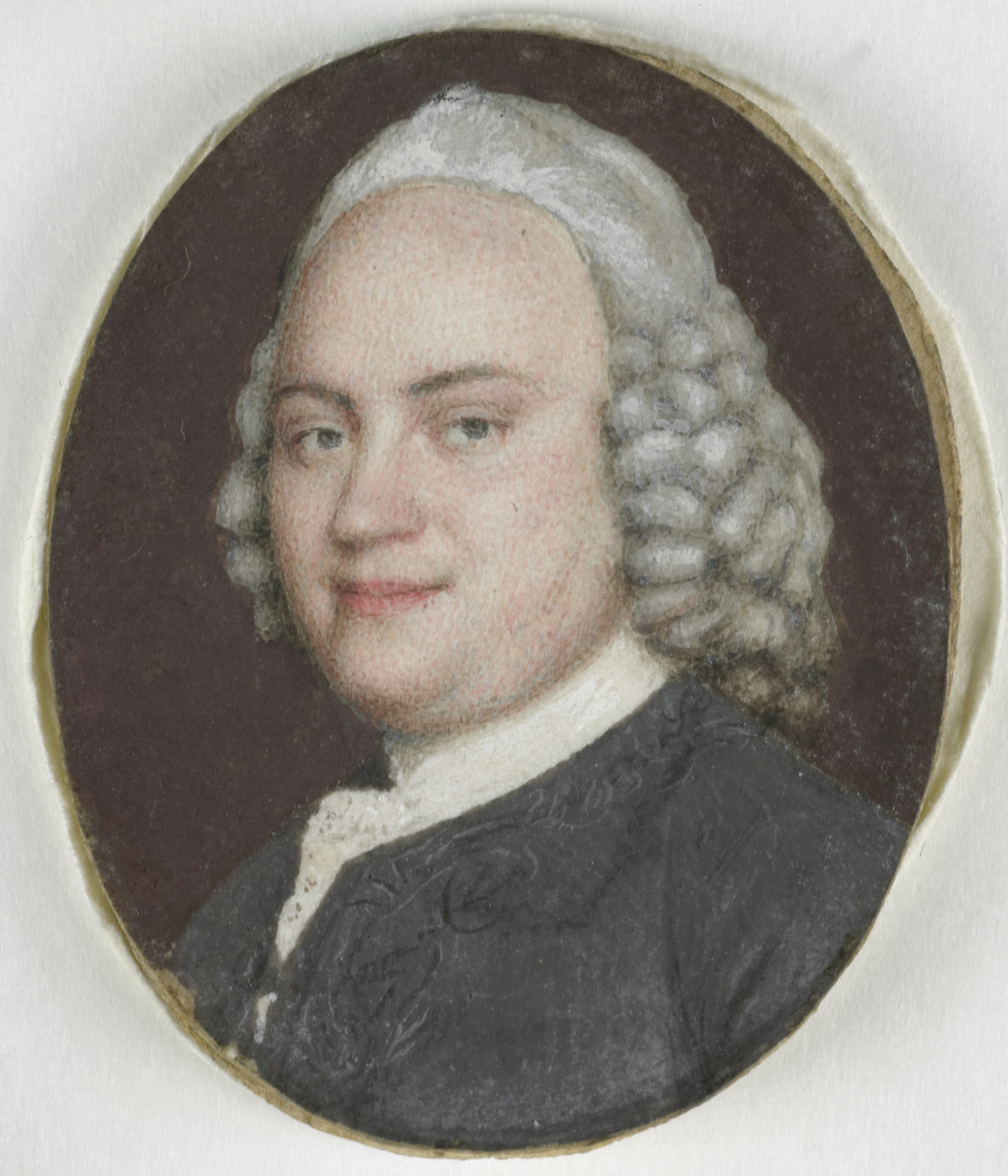 Portret van Pieter van Bleiswijk (1724-90). Raadpensionaris van Holland. Buste naar links, het gelaat naar de beschouwer gekeerd. Onderdeel van de collectie portretminiaturen.